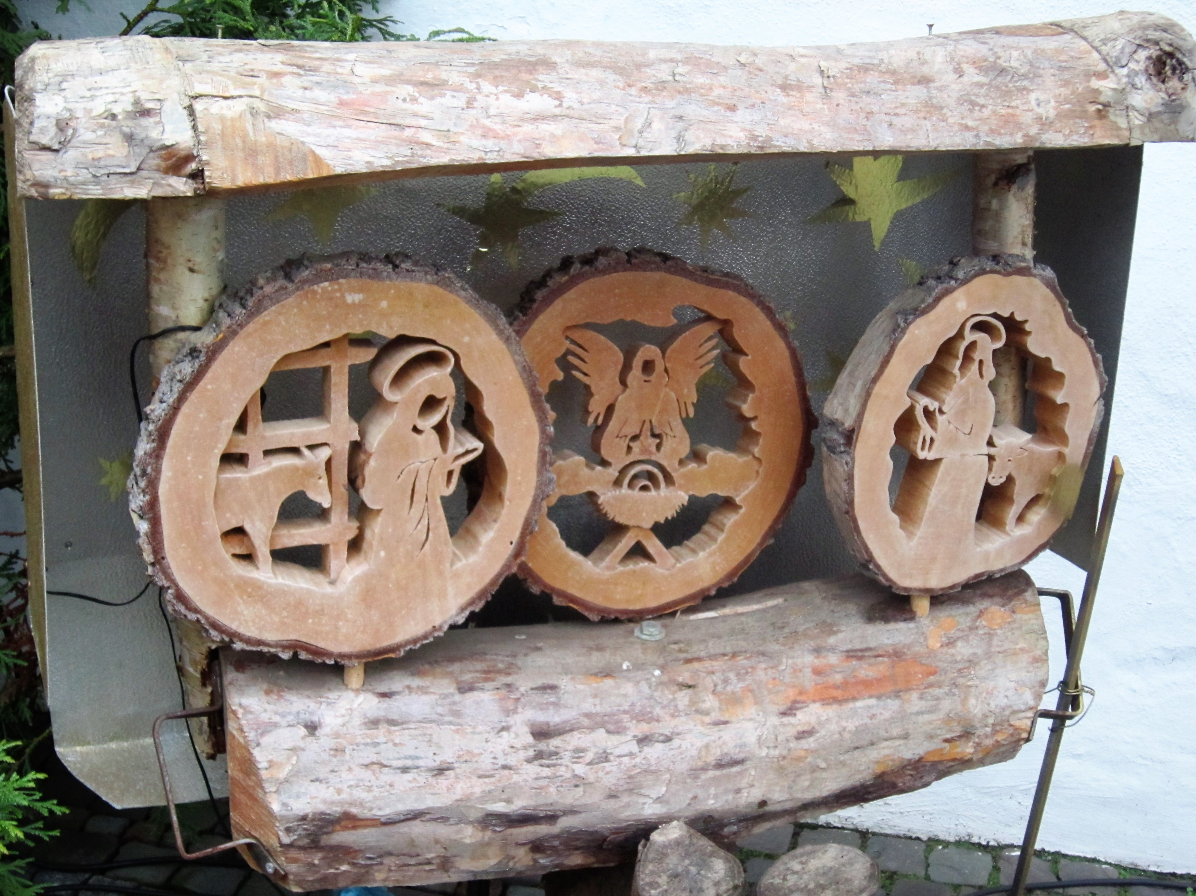 Ausgesägte Krippenszene auf dem Handorfer Krippenweg